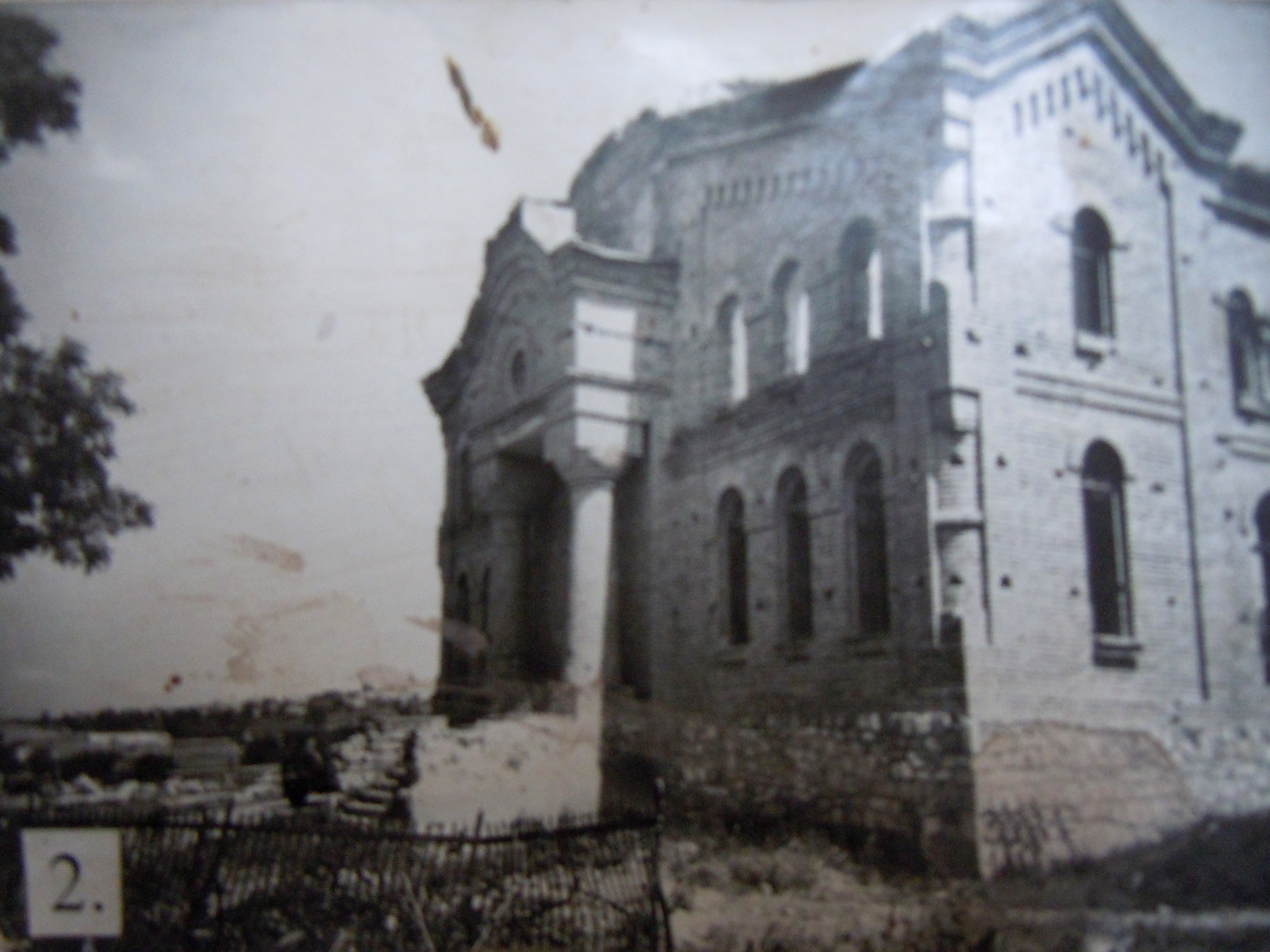 Церква, с. Криничне, Ювілейна вул.